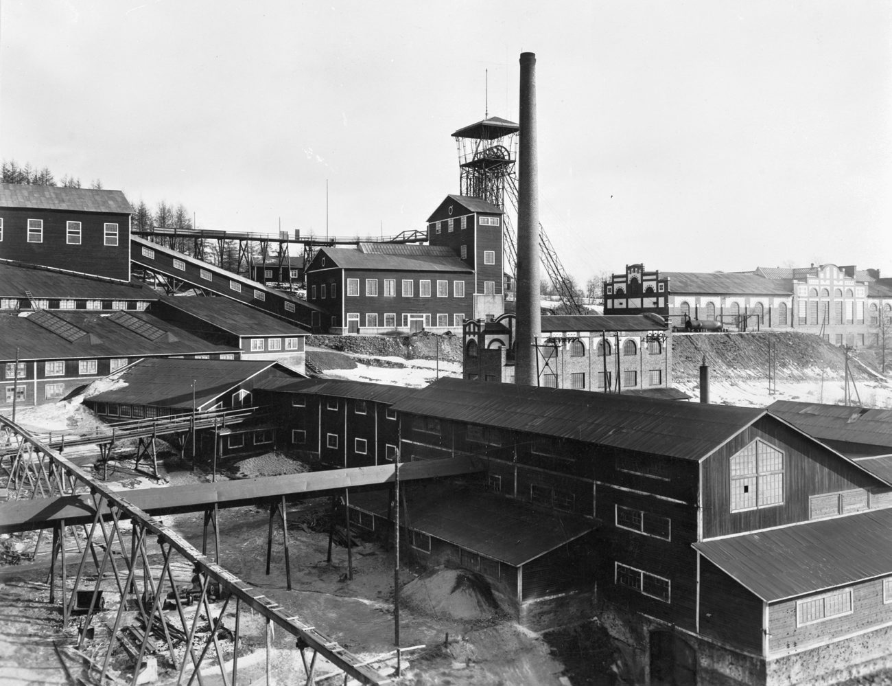 C14295. Stråssa järngruva. Fotografiet är skänkt till Tekniska museet från Svenska Turistföreningen.